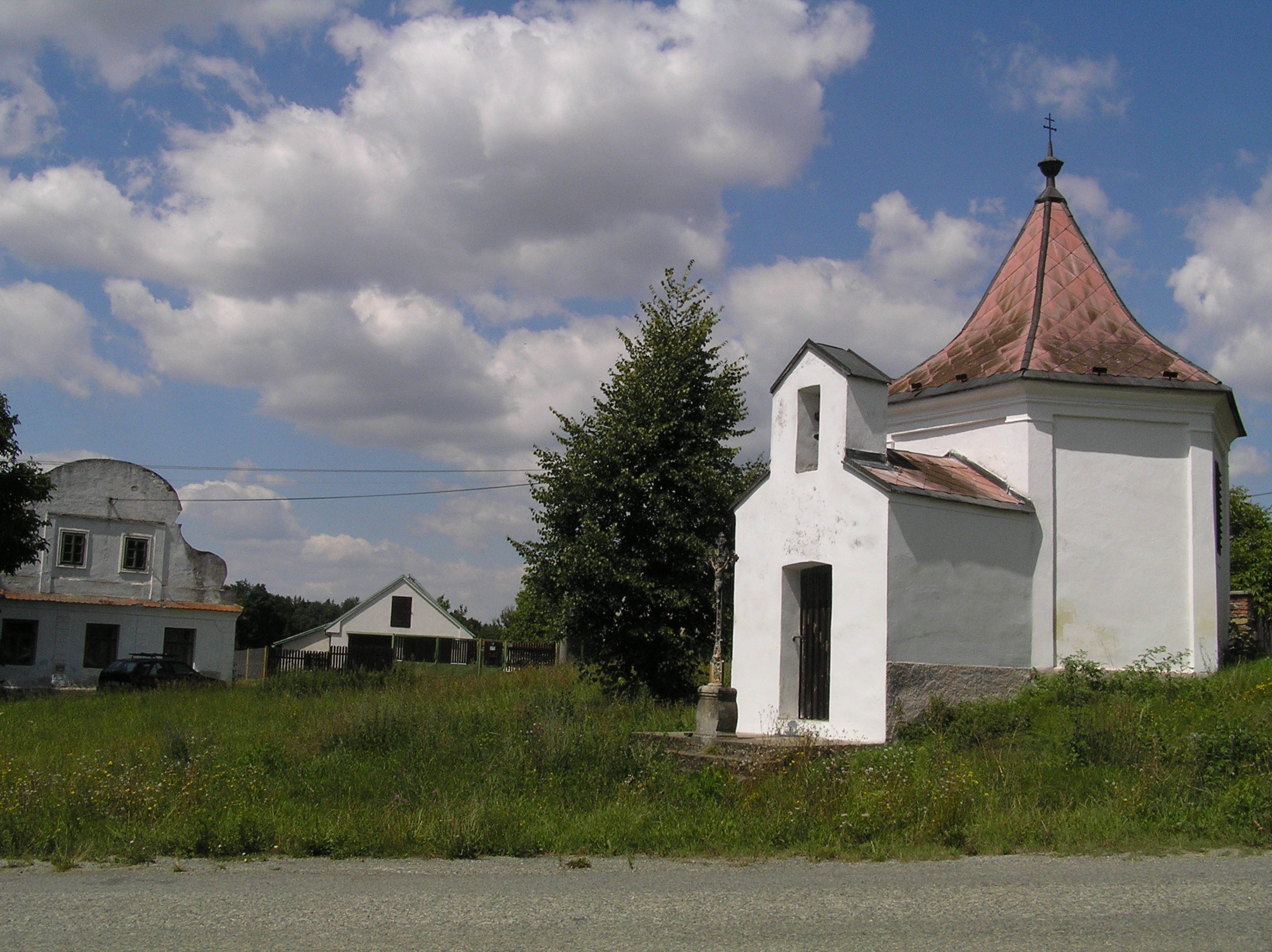 Usedlost čp. 14, Krchova Lomná 14, Krchova Lomná.